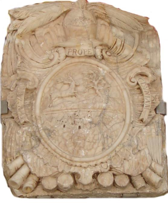 [Escudo de Cervera del río Alhama]